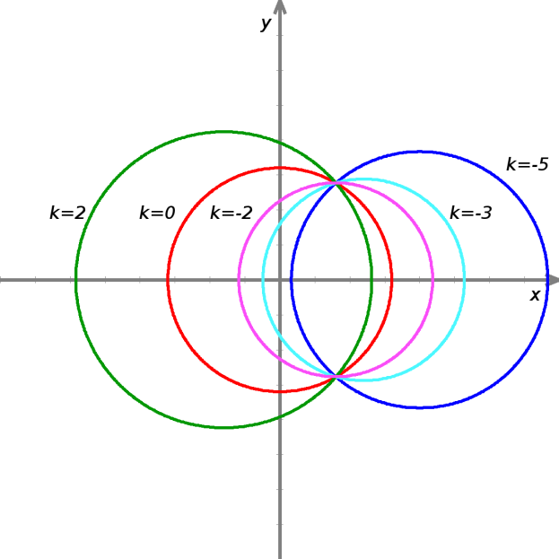 Esempio di fascio di circonferenze: nel grafico sono disegnate alcune delle circonferenze del fascio x² + y² + kx - (k+4) = 0. Sheaf of circles example: some of the sheaf's circles x² + y² + kx - (k+4) = 0 are drawn.